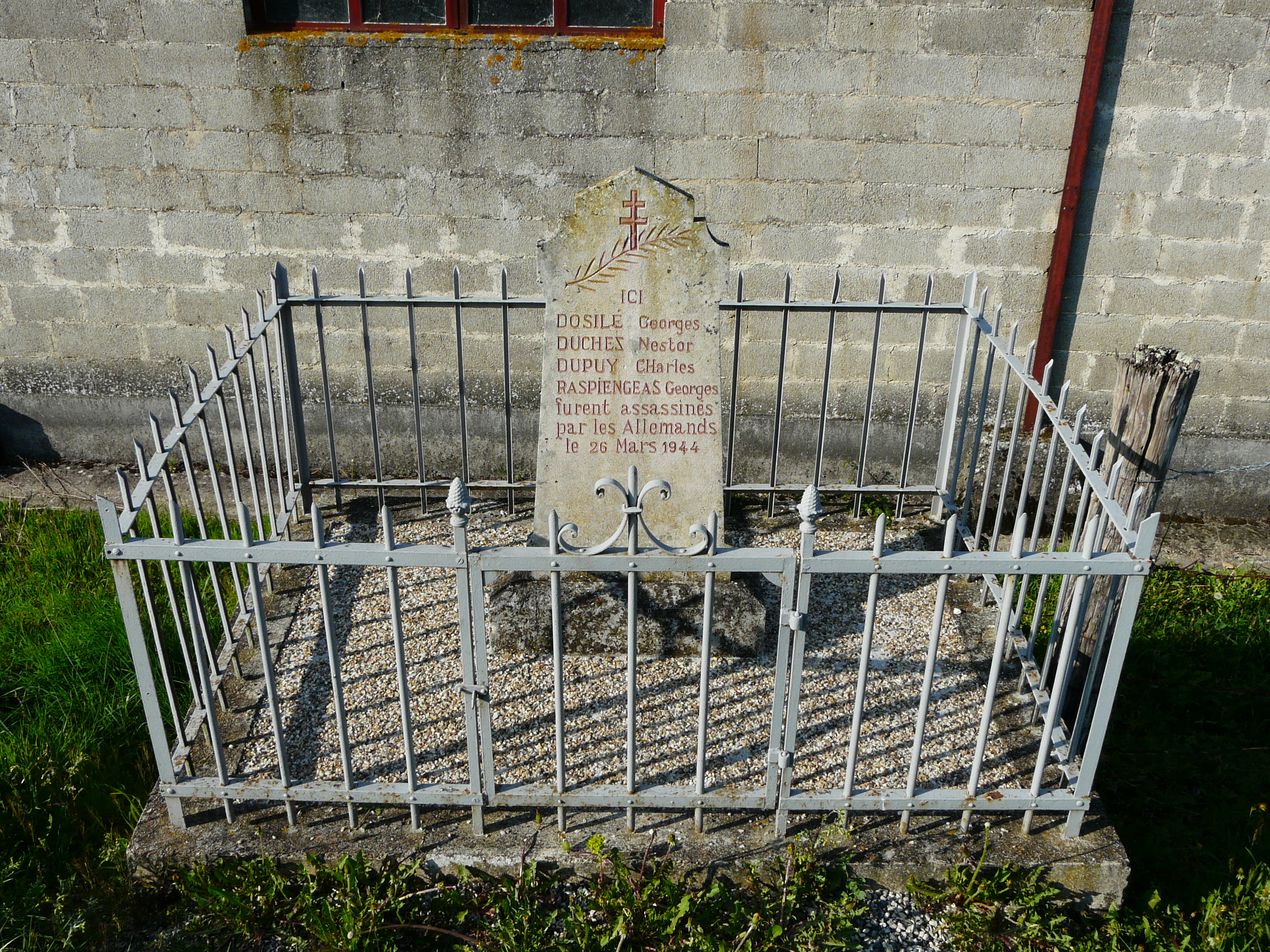 Stèle à la mémoire des quatre personnes fusillées le 26 mars 1944 à Saint-Martin-de-Ribérac, Dordogne, France.